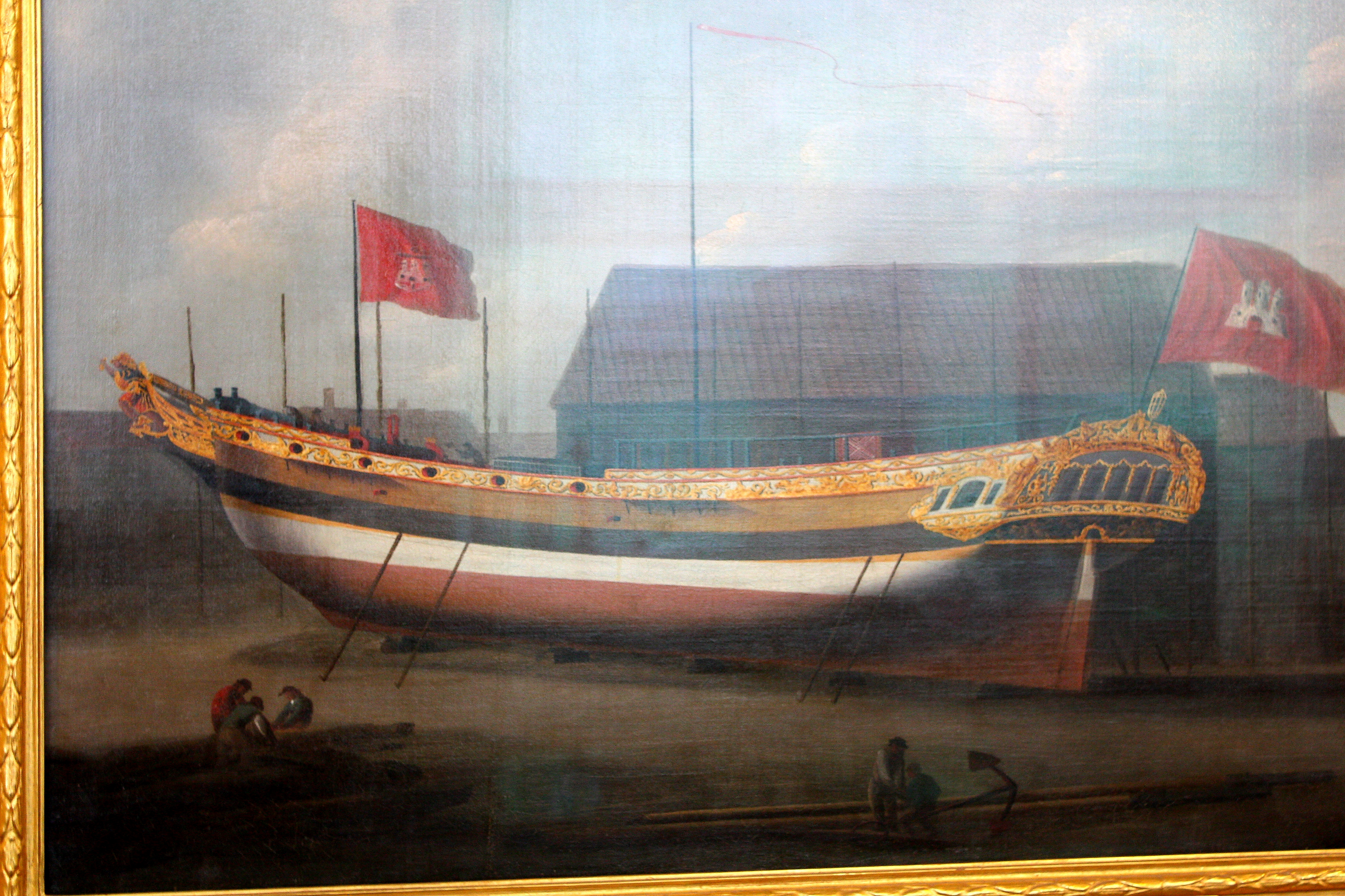 Gemäldeausschnitt einer in England gebauten Staatsjacht (Stapellauf 1787), die das letzte Konvoischiff "Wapen von Hamburg (IV) ablöste und lediglich repräsentative Aufgaben hatte. Sie war mit 12 Kanonen bestückt. Das Gemälde könnte von Robert Cleveley (1747-1809) gemalt worden sein.